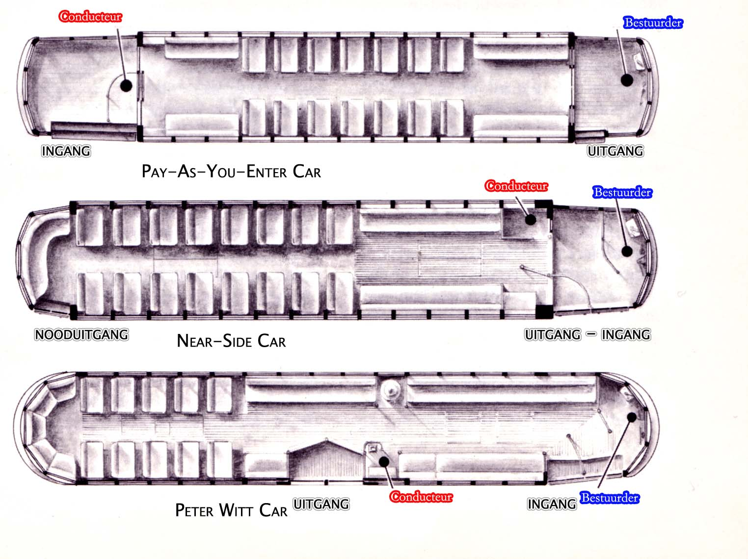 Zelfgetekende media m.b.v. Photoshop 7